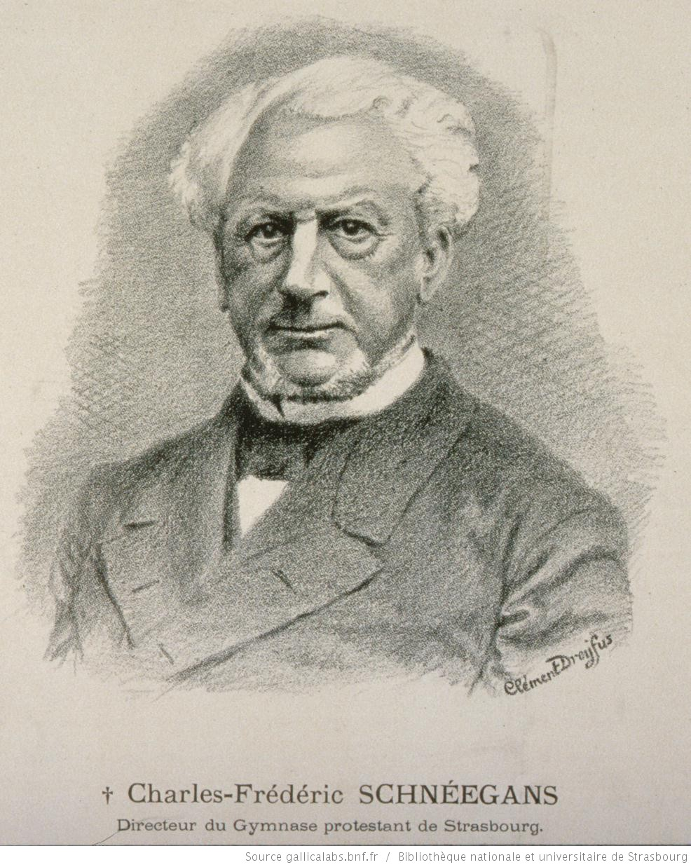 Charles Frédéric Schneegans, directeur du Gymnase protestant de Strasbourg, Buste, 3/4 à gauche. Dessin de Clément Dreyfus ( Coll. Bibliothèque nationale et universitaire de Strasbourg)